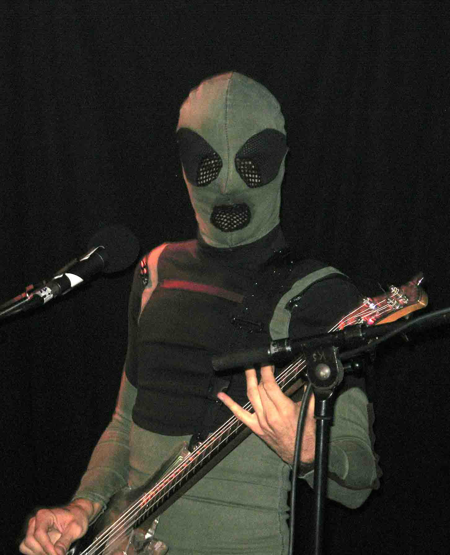 04.12.05 Gleis 22, Münster